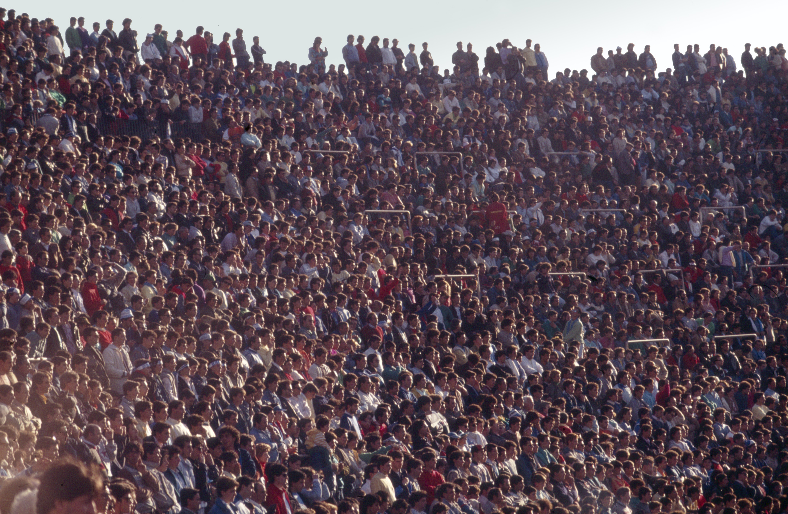 Napoli vs Argentina am 29.03.1986